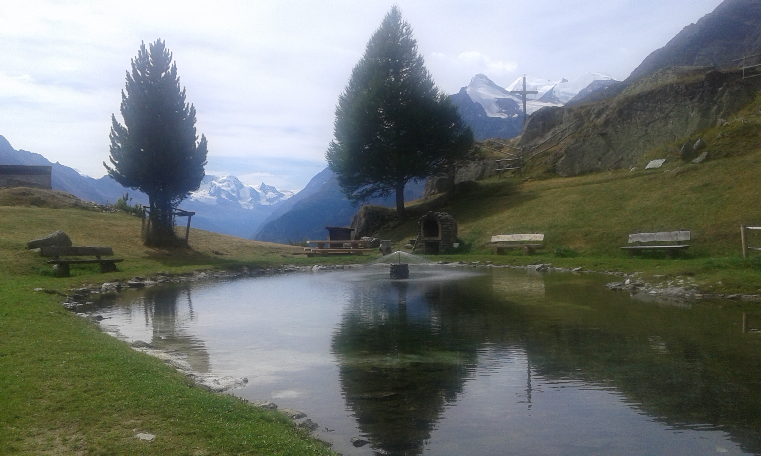 Rastplatz Seewjinen auf 1'998 m oberhalb der Siedlung Jungen VS. Im Hinergrund Breithorn und Klein Matterhorn. Rechts Brunegghorn, Weisshorn und Bishorn.